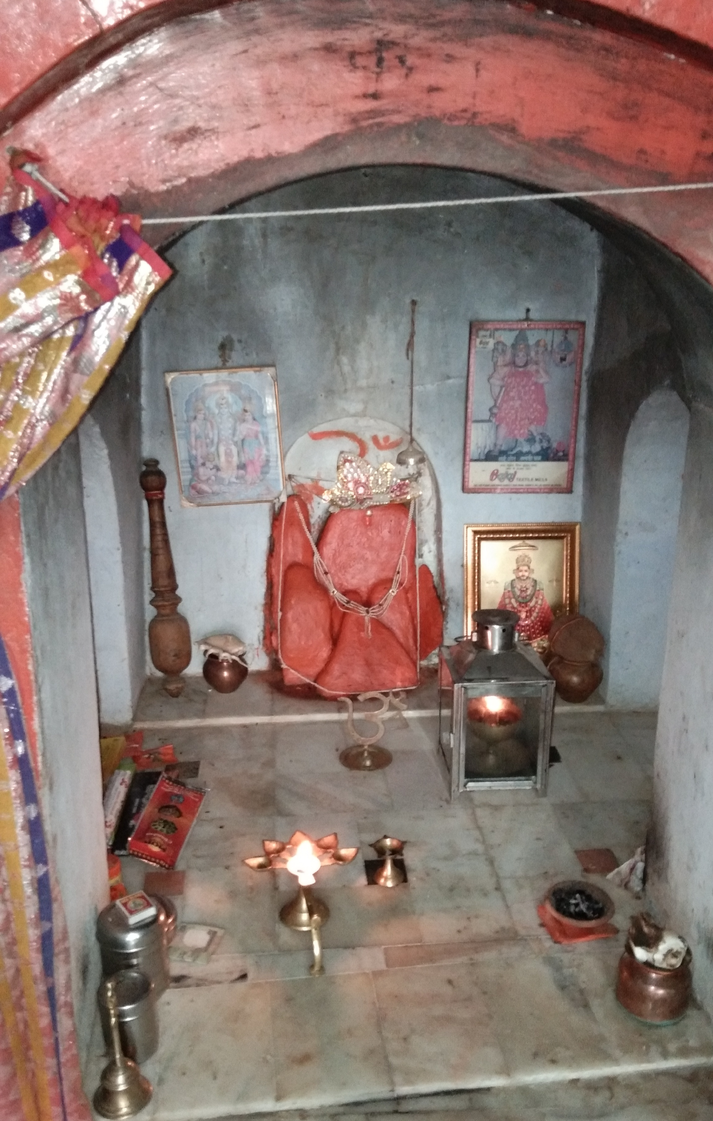 बालाजी